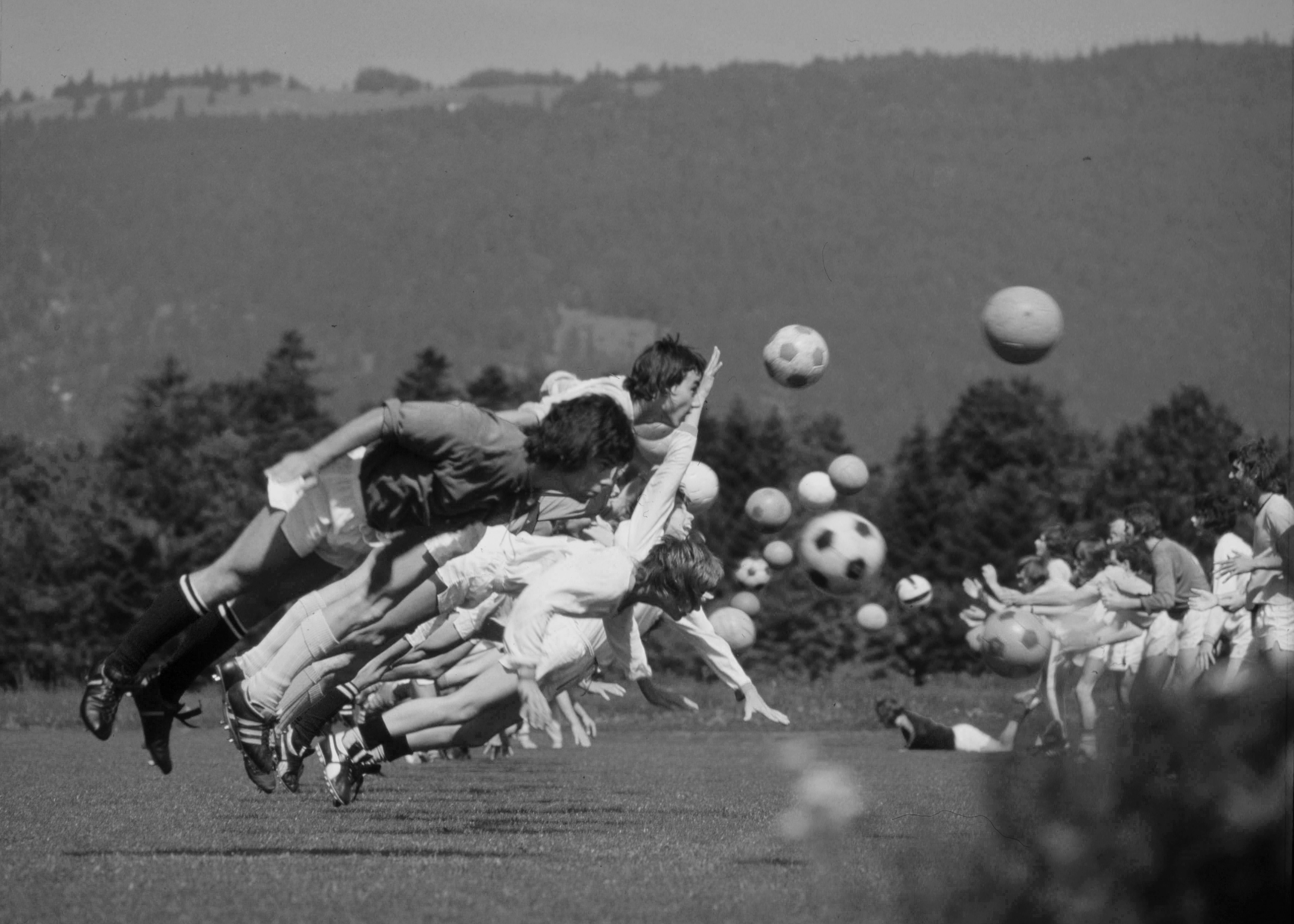 Fussball